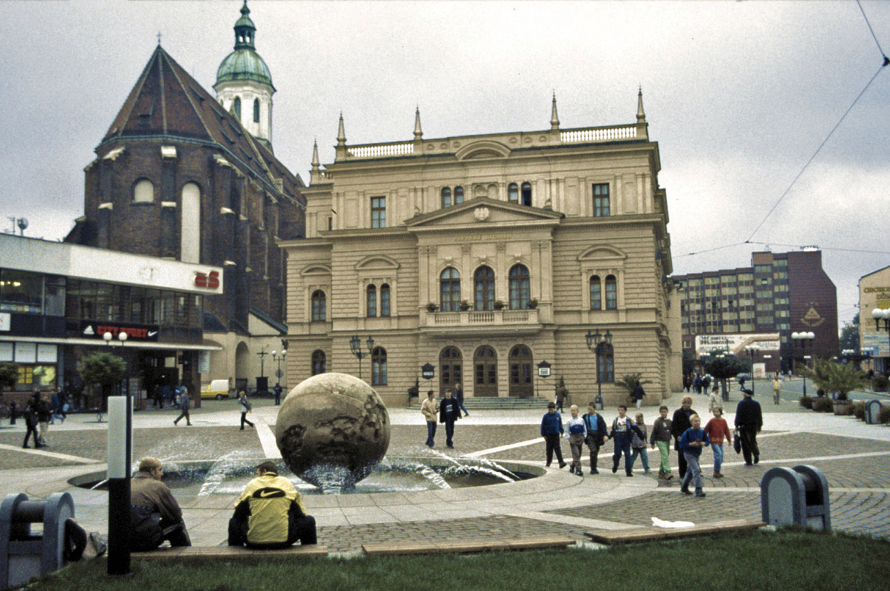 Oberring (Horní náměstí) mit Theater und Konkathedrale